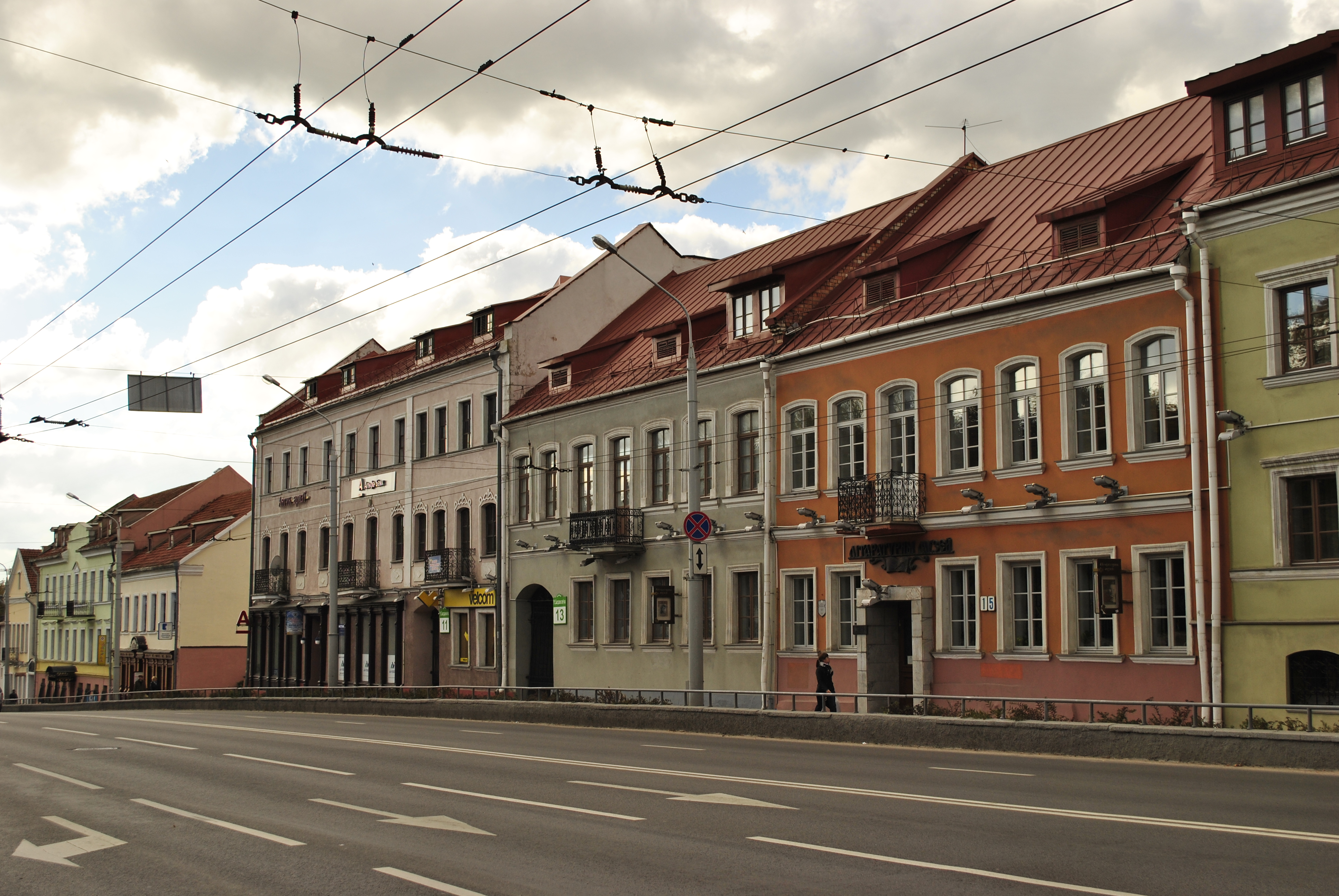 Минск, Беларусь, центр города, архитектура